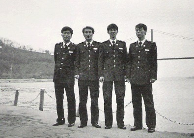 1989년 제6기 소방간부후보생 마재윤, 이창섭 등